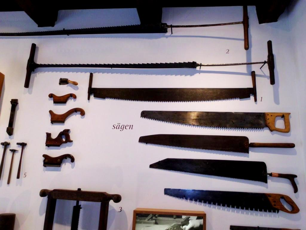 Binnenschiffswerft, Sägen, wichtige Werkzeuge der Schiffbauer